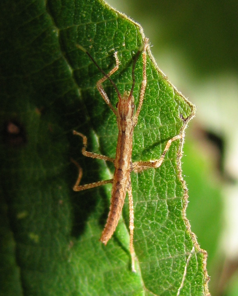 en.: Neohirasea maerens - even hatched larva de.: Teppichschrecke (Neohirasea maerens) - gerade geschlüpfte Larve